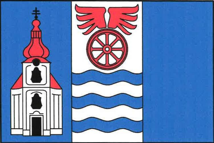 Vlajka obce Poříčany